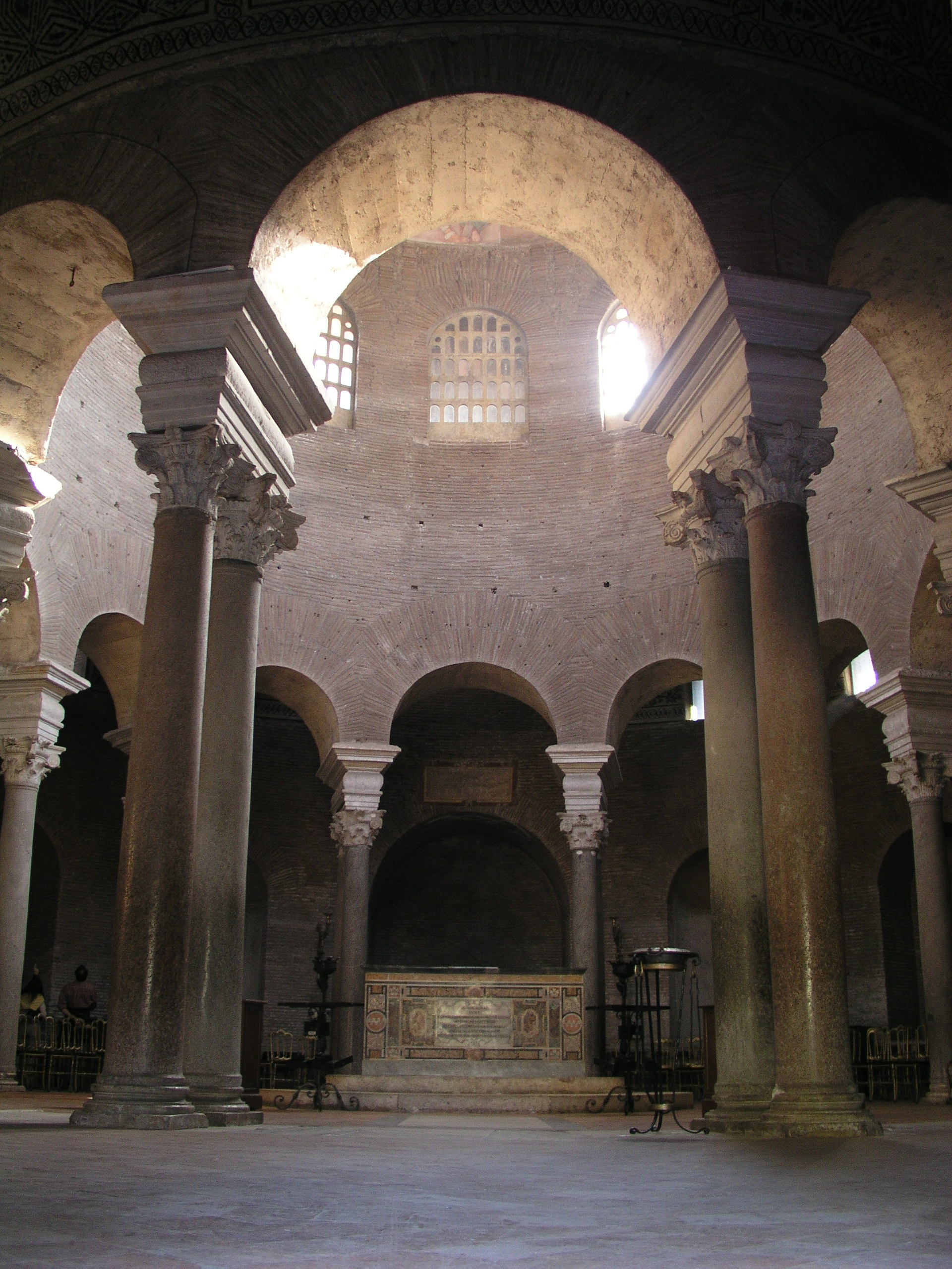 santa constanza, rome, probably mausoleum to constantia, daughter of emporer constantine, AD 350